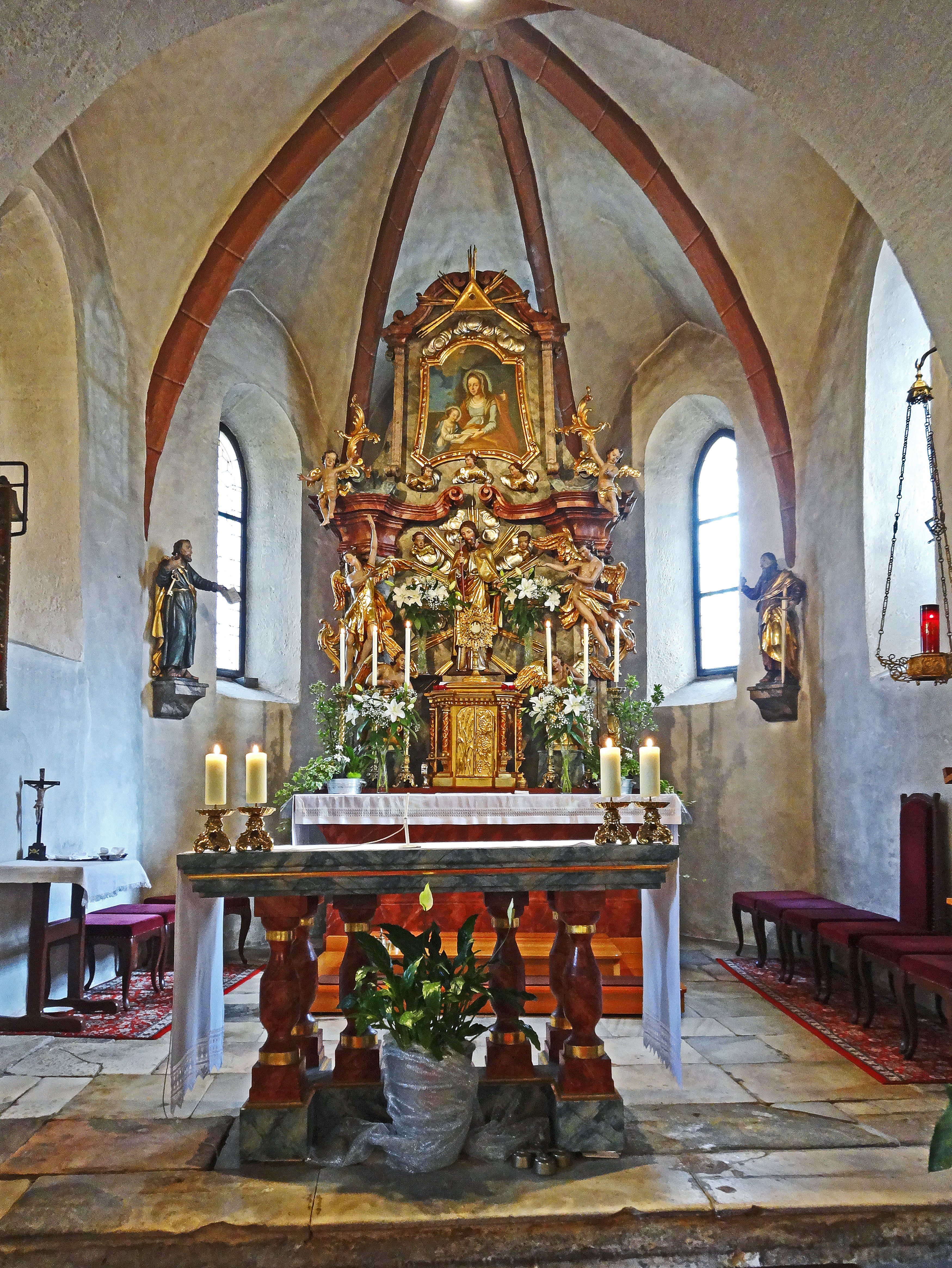 Kath. Pfarrkirche hl. Jakobus d. Ä., der Hochaltar